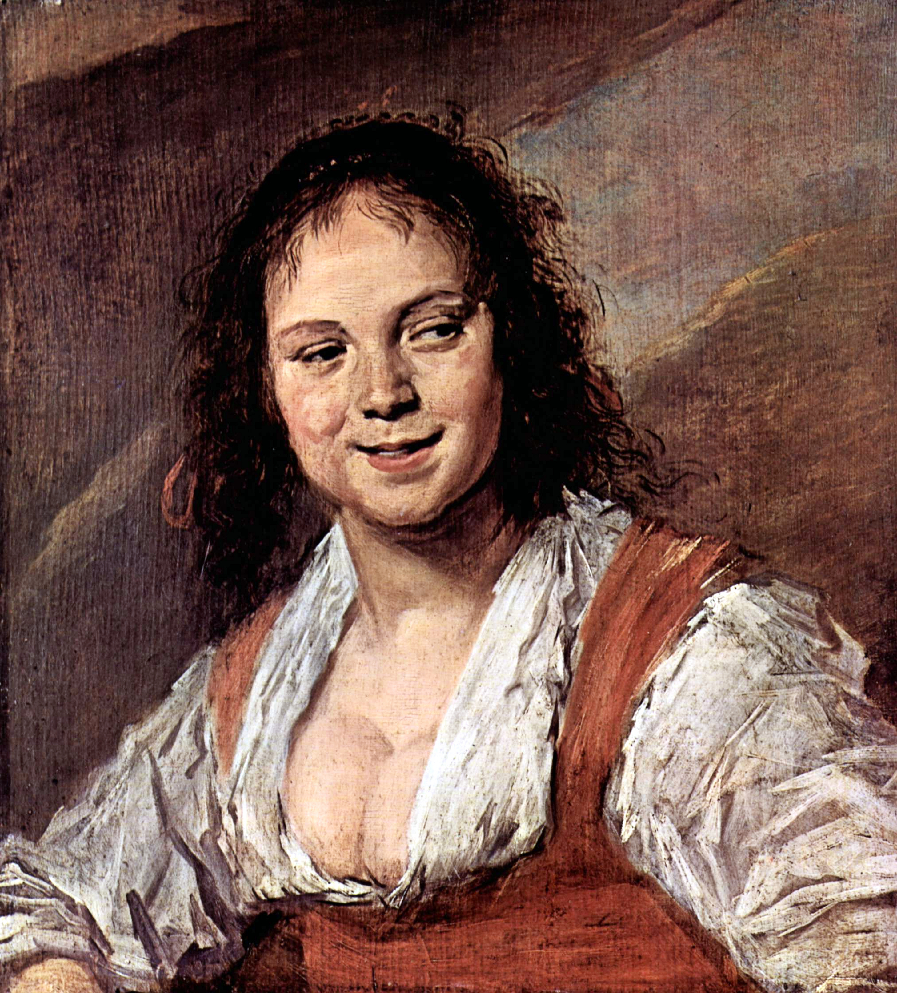 Gemälde stellt ein Zigeunermädchen dar